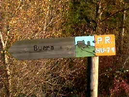 El Buera es un pueblo del Somontano de Barbastro, enclavado en el Parque Cultural del río Vero, forma parte de la Ruta del vino,(Denominación de Origen Somontano), que sigue el antiguo sendero P.R. Hu-71 en las estribaciones de la Sierra de Guara.